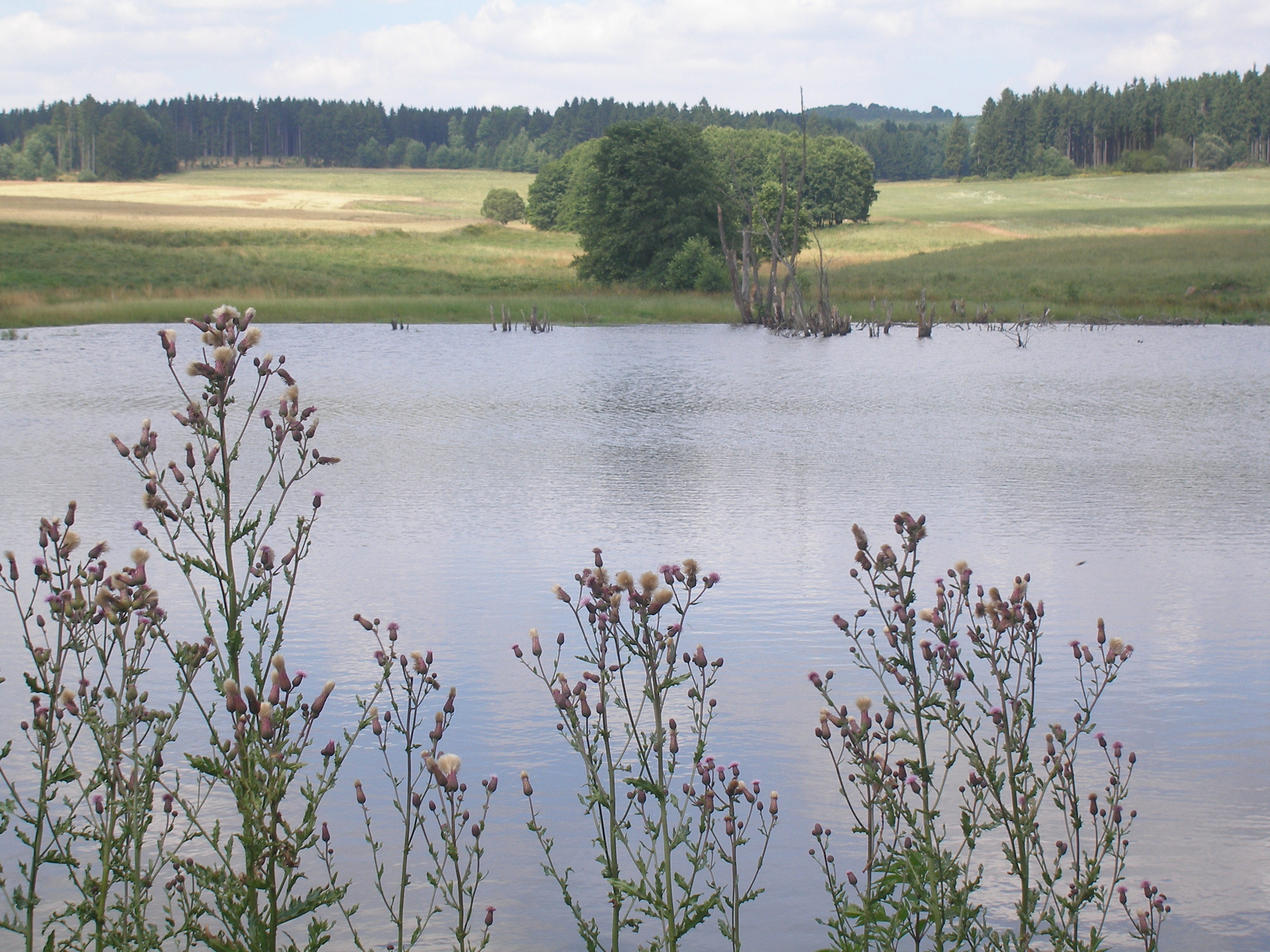 Rybník v blízkosti Svinova (okres KV)